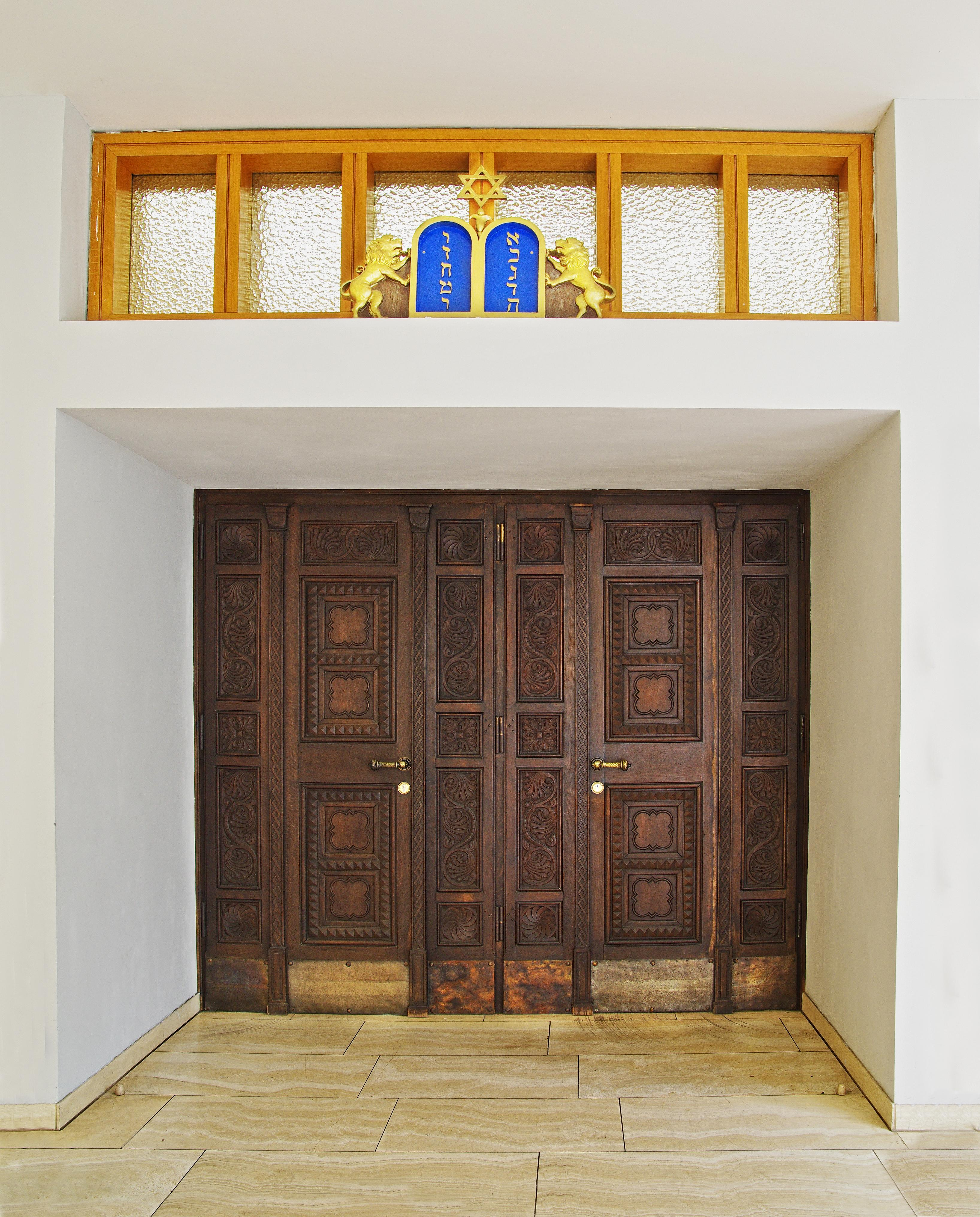 Der Eingang zur neuen Freiburger Synyagoge, mit der Tür aus der alten Synagoge und dem Kunstwerk mit den zwei Löwen. Dies sind die beiden einzigen Teile, die von der alten Synagoge übrig geblieben sind.